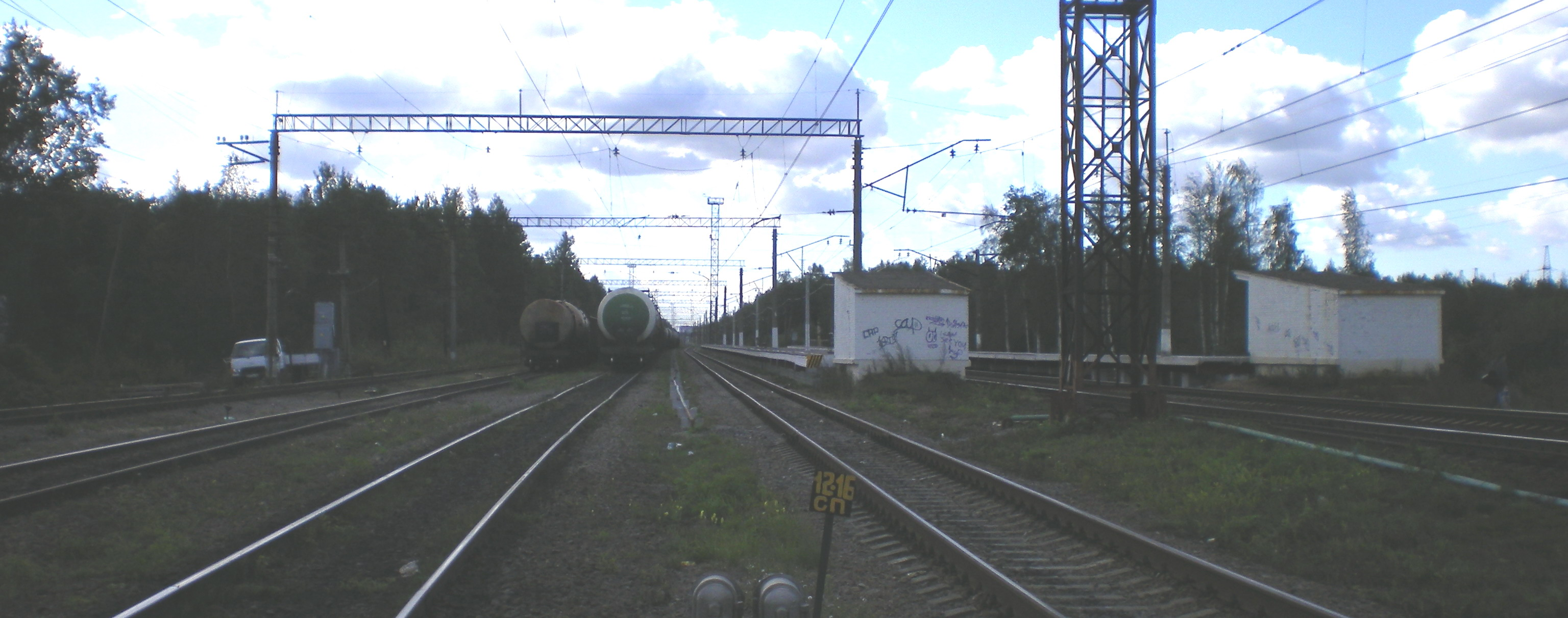 Все постройки станции: касса, платформы и подземные переходы.